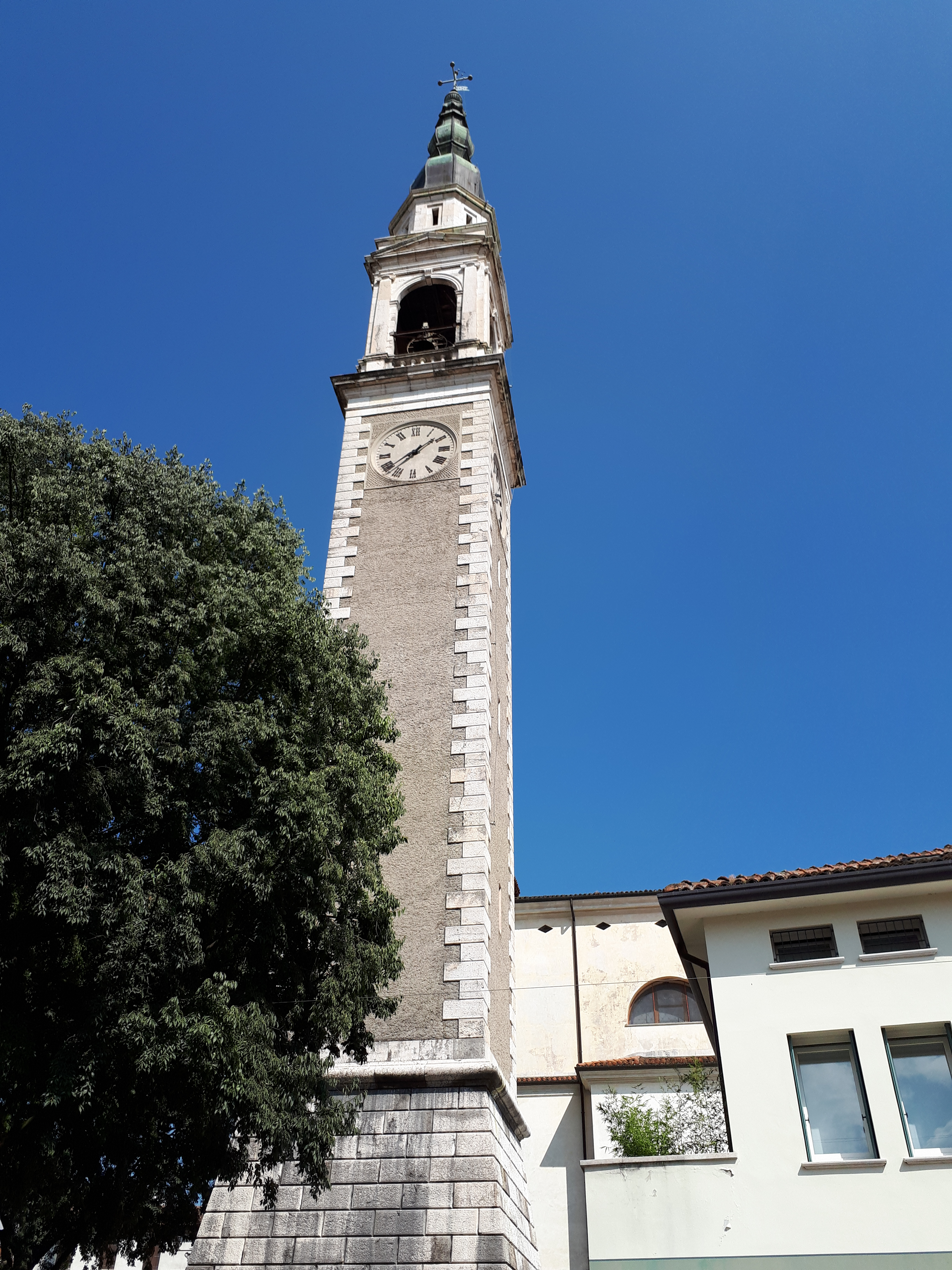 Torre campanaria della parrocchiale di Magrè di Schio